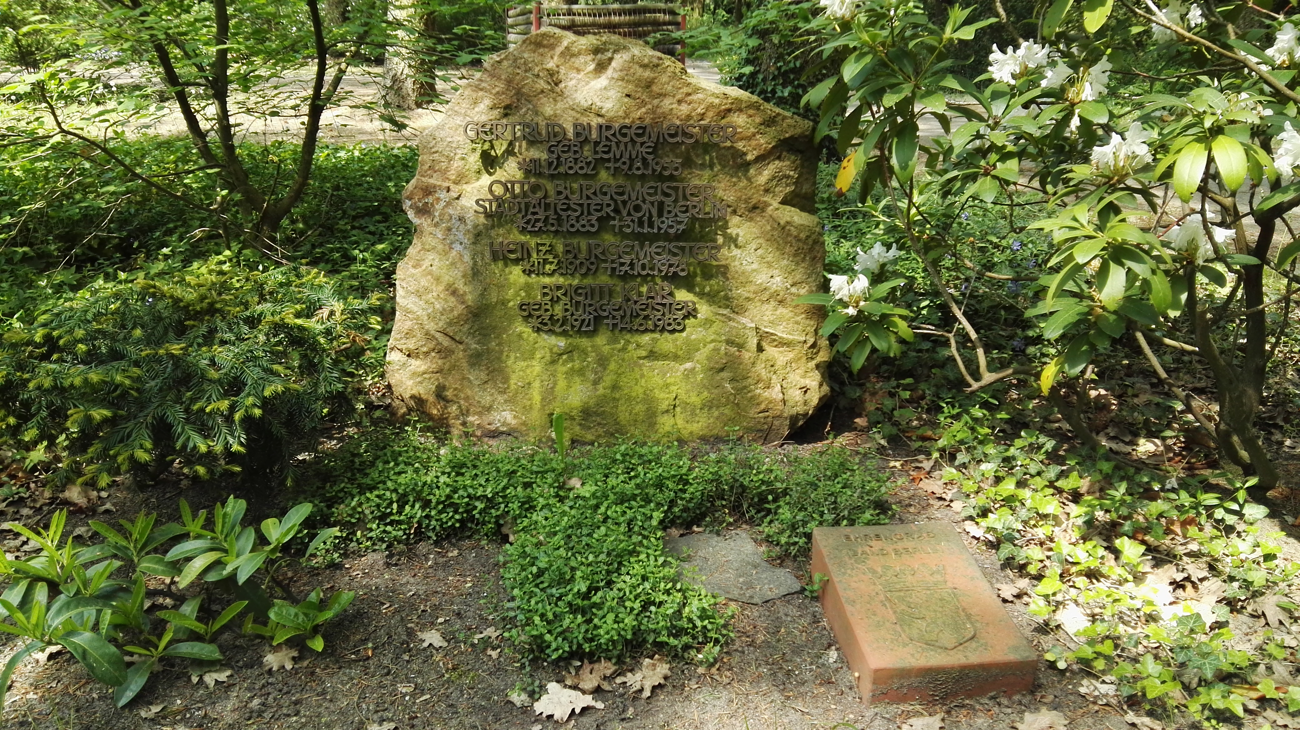 Grab von Otto Burgemeister auf dem Heidefriedhof in Berlin; Ehrengrab